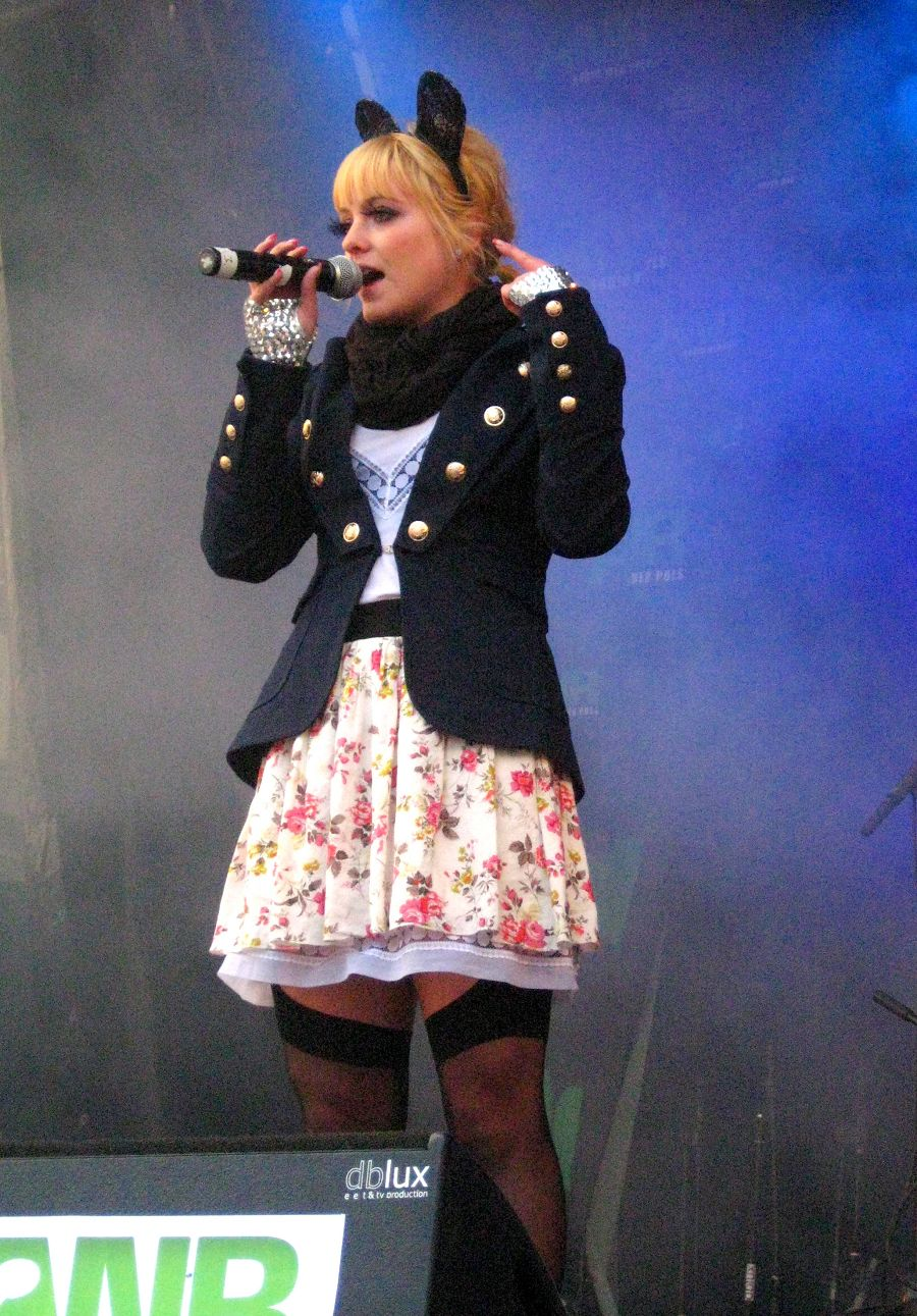 Sys Bjerre, Hjørring, september 2010